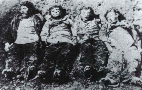 Briganti della banda Volonnino, foto scattata nella metà dell'ottocento